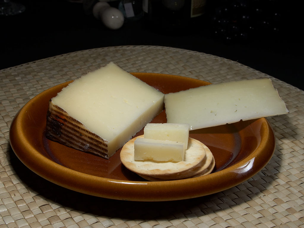 Zamorano Cheese.